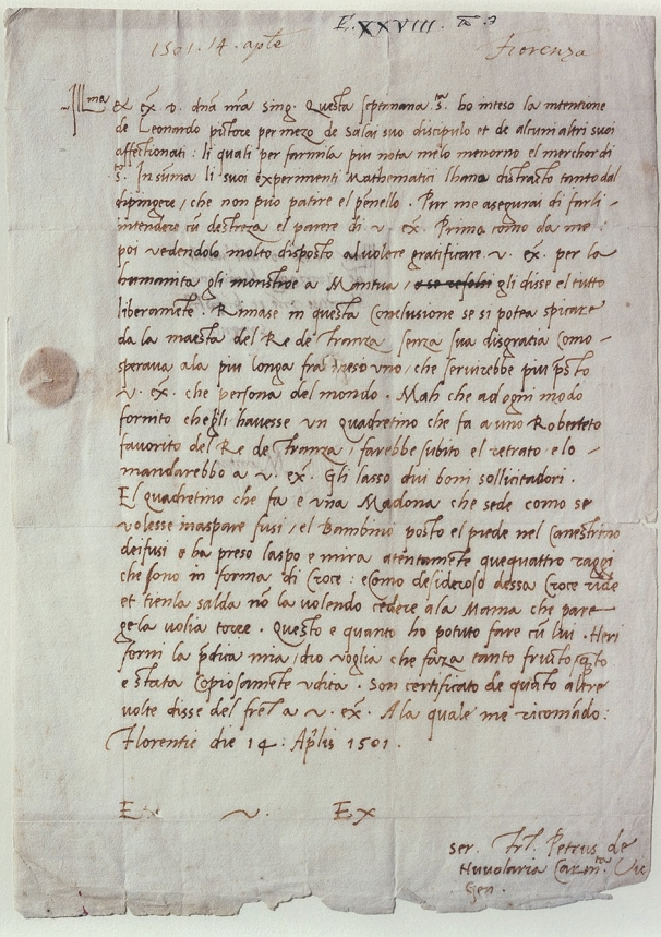 Lettre de Fra Pietro da Novellara à Isabelle d'Este 14 avril 1501 dans laquelle le travail de Léonard de Vinci est mentionné. Elle décrit notamment un tableau en cours de réalisation pour Florimond Robertet, secrétaire et favori du roi de France, Louis XII, qui serait La Madone au fuseau.